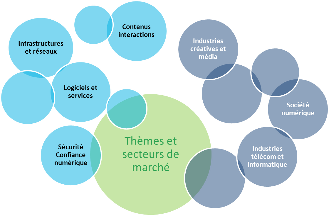 Plan des thématiques développées par le pôle Images & Réseaux